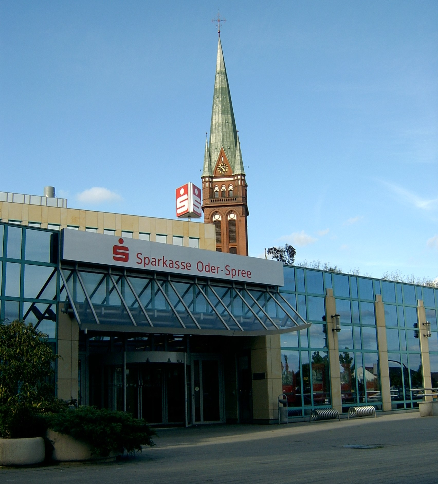 Sparkasse Oder-Spree in Frankfurt (Oder), Franz-Mehring-Str. 22. Im Hintergrund die Kirche zum heiligen Kreuz